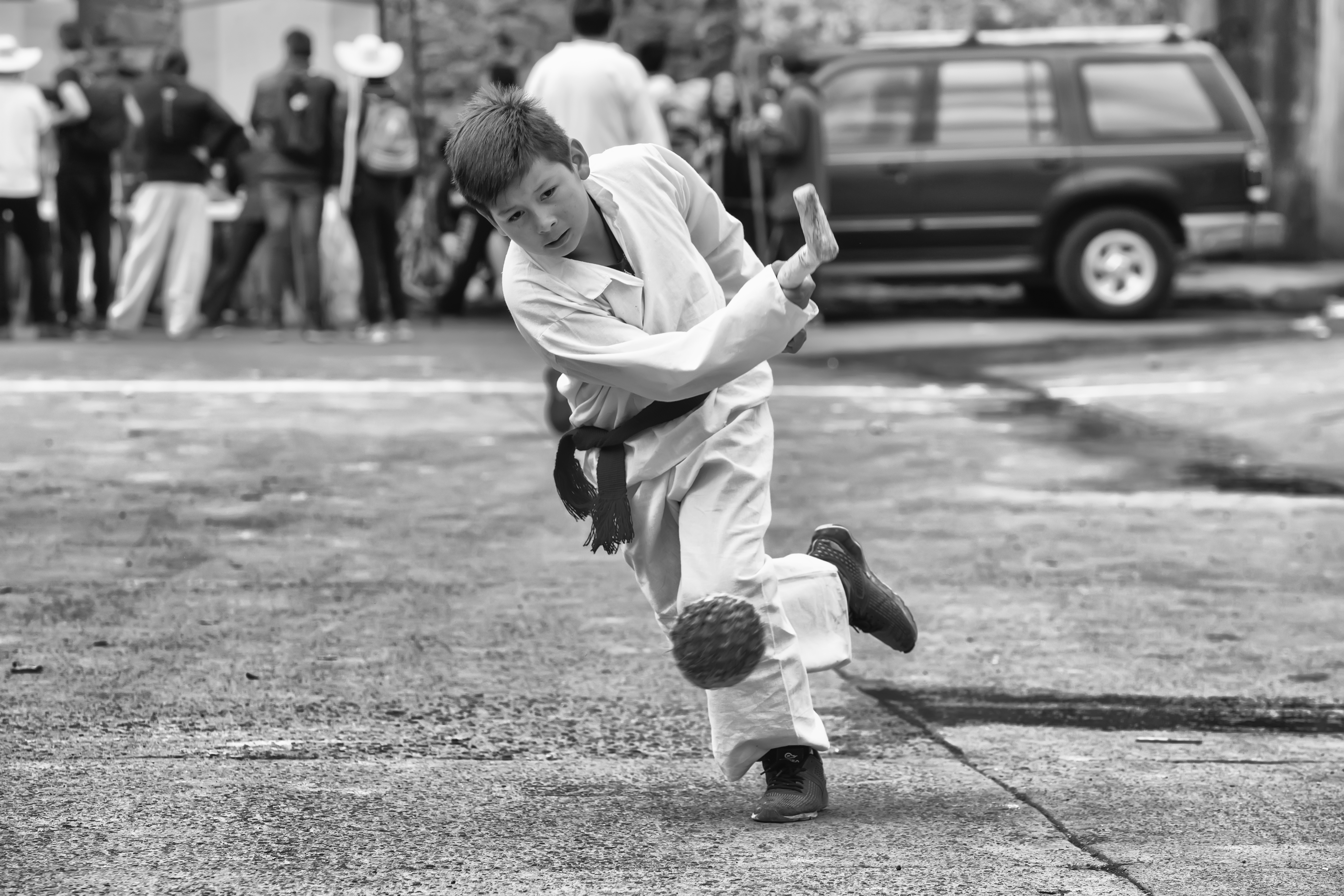 Juego de Pelota En Michoacán,un deporte autóctono del estado llamado Uárukua Ch'anakua o Pasarutakua en purépecha. El juego de pelota purépecha conmemoraba el nacimiento del sol y a la vez, fue creado con la intención de lograr el equilibrio del cosmos.